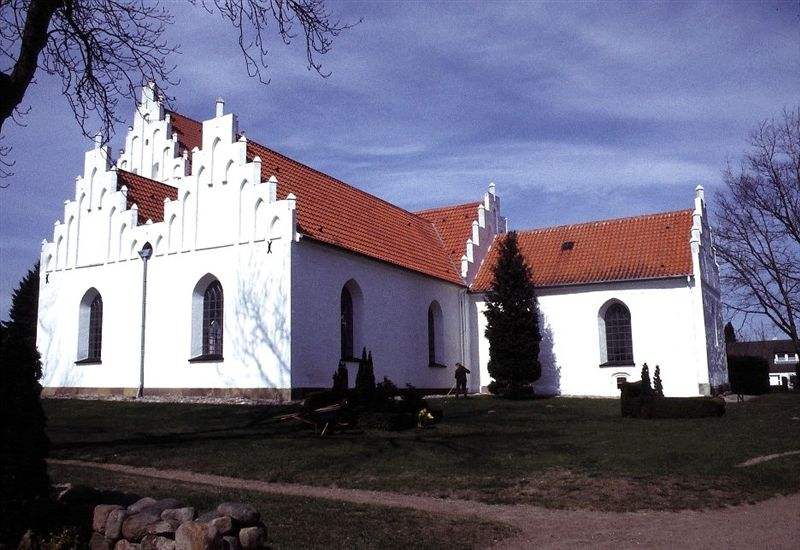 Hårby Kirke i Danmark. Hårby kirke